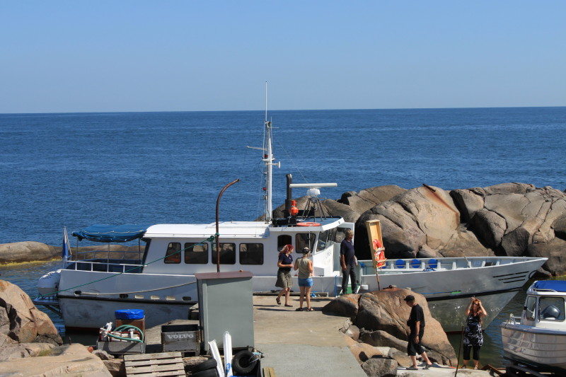 Alus Bengtskärin laiturissa.